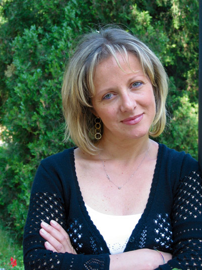 Emanuela Da Ros